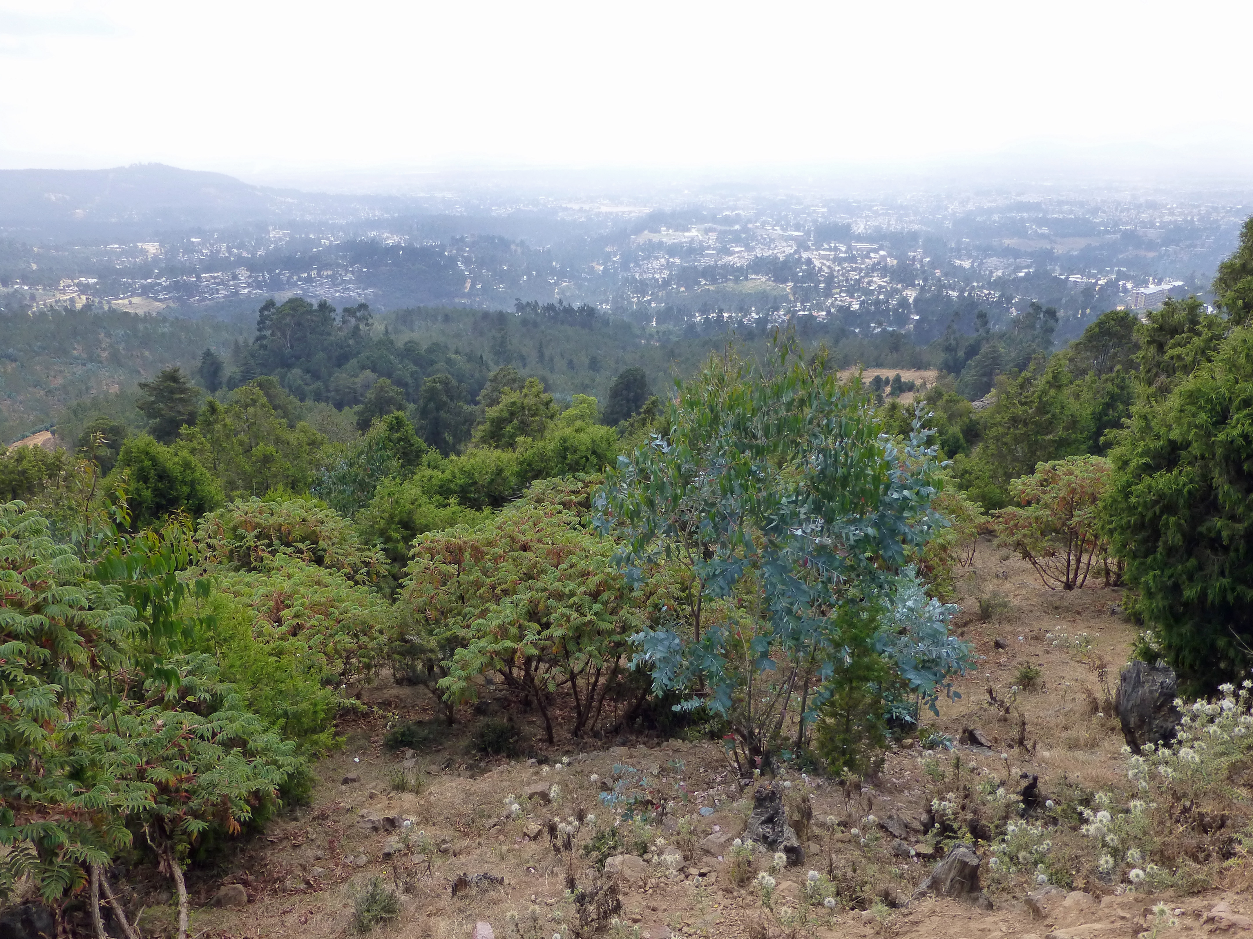 Addis Abeba (Ethiopie) : collines d'Entoto